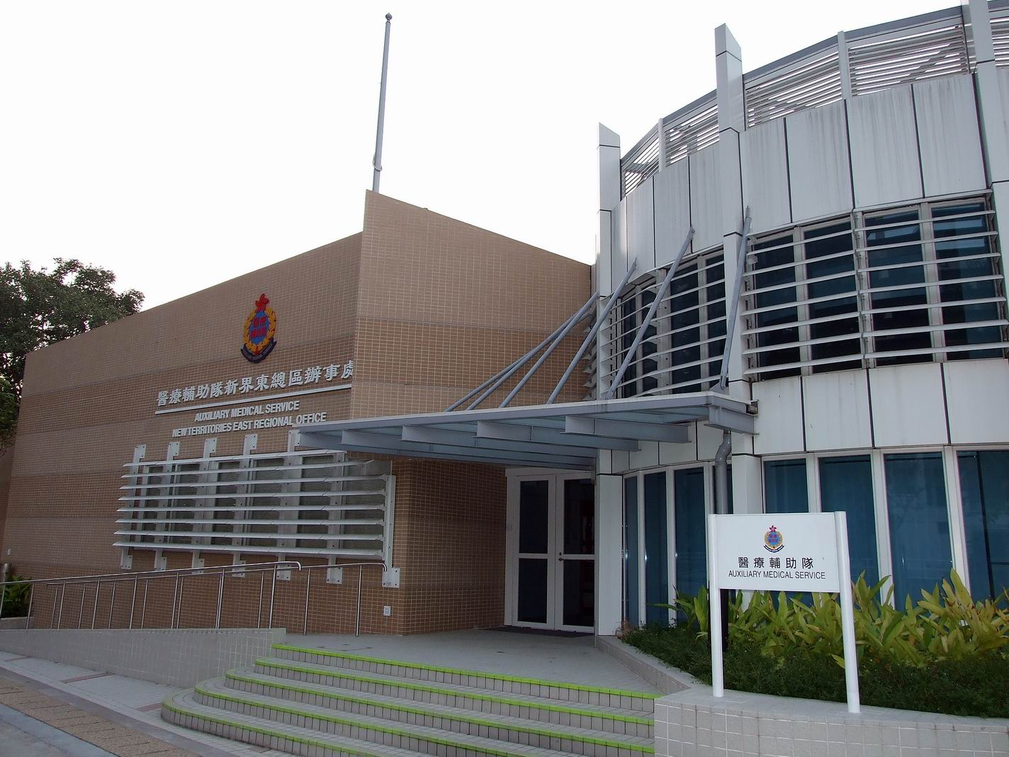 醫療輔助隊新界東總區辦事處